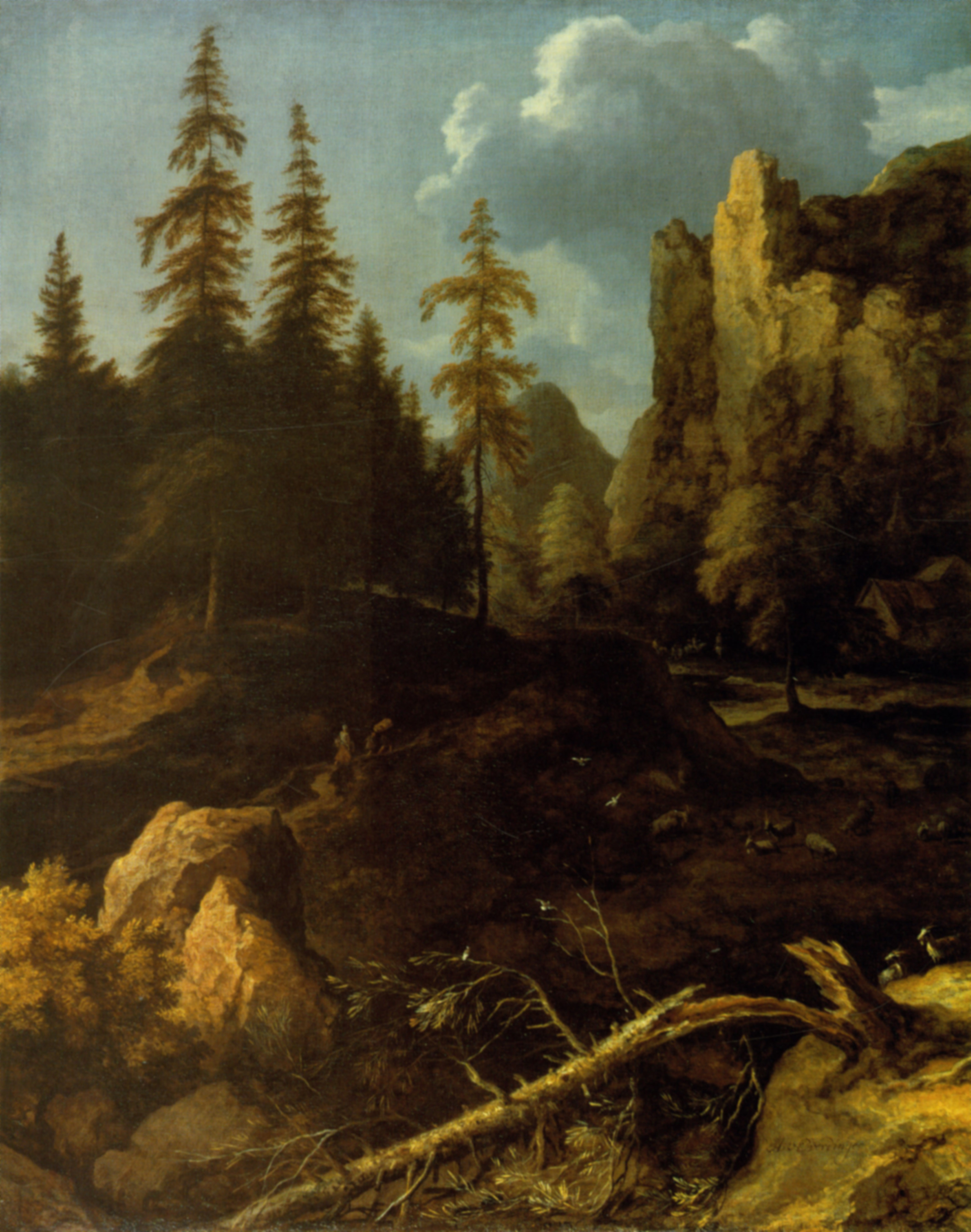 Norwegische Gebirgslandschaft